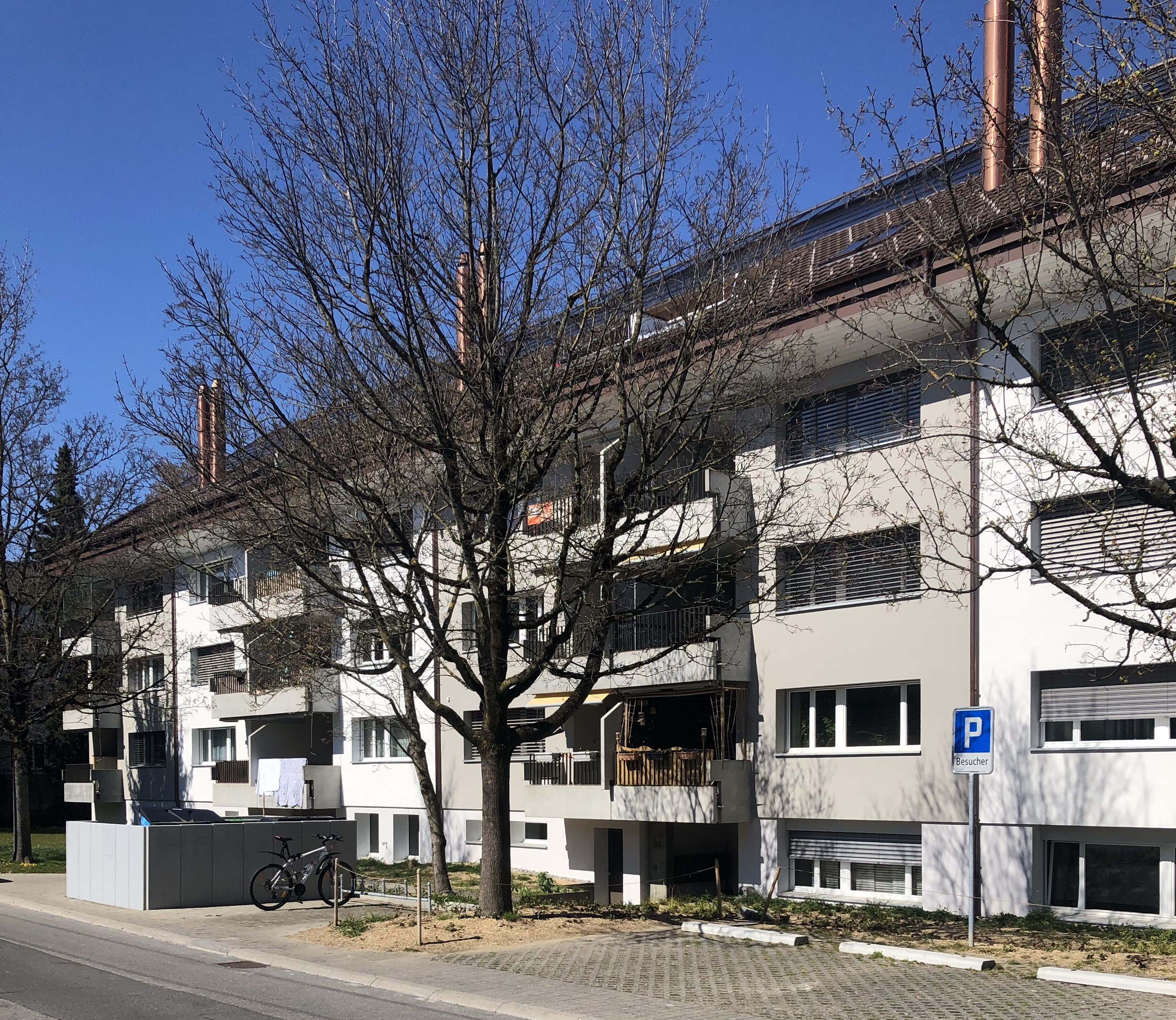 Untermatt Bebauung